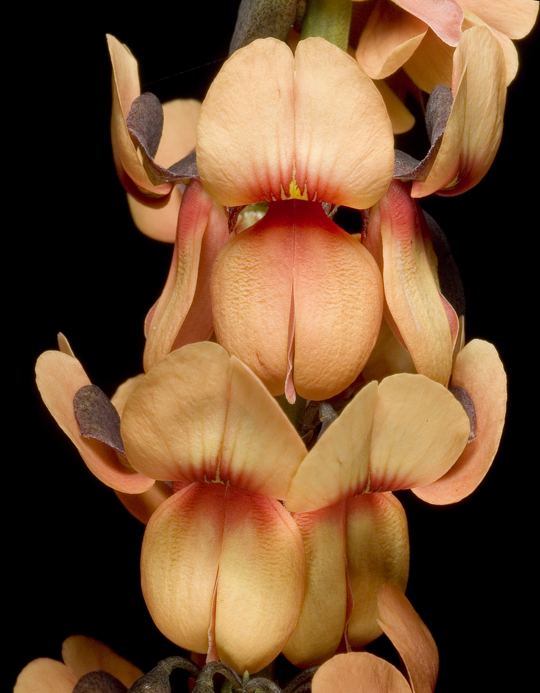 KRT3847